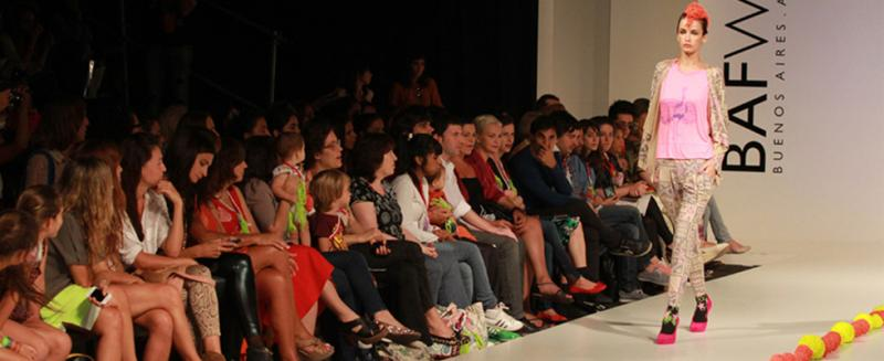 Pasarela de BAFWEEK.